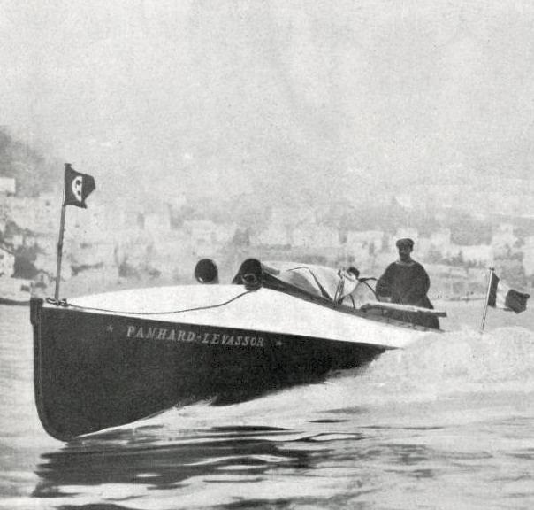 Avril 1905, le 'Panhard et Levassor' du comte Robert de Vogüe gagne le "Championnat de la Mer" organisé Monaco, en battant tous les records du monde à partir de 50 kilomètres.